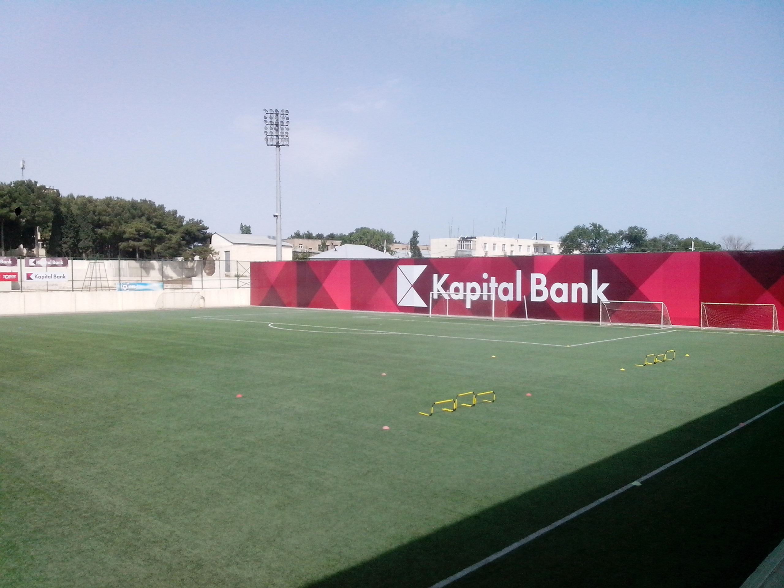 Kapital Bank Arena